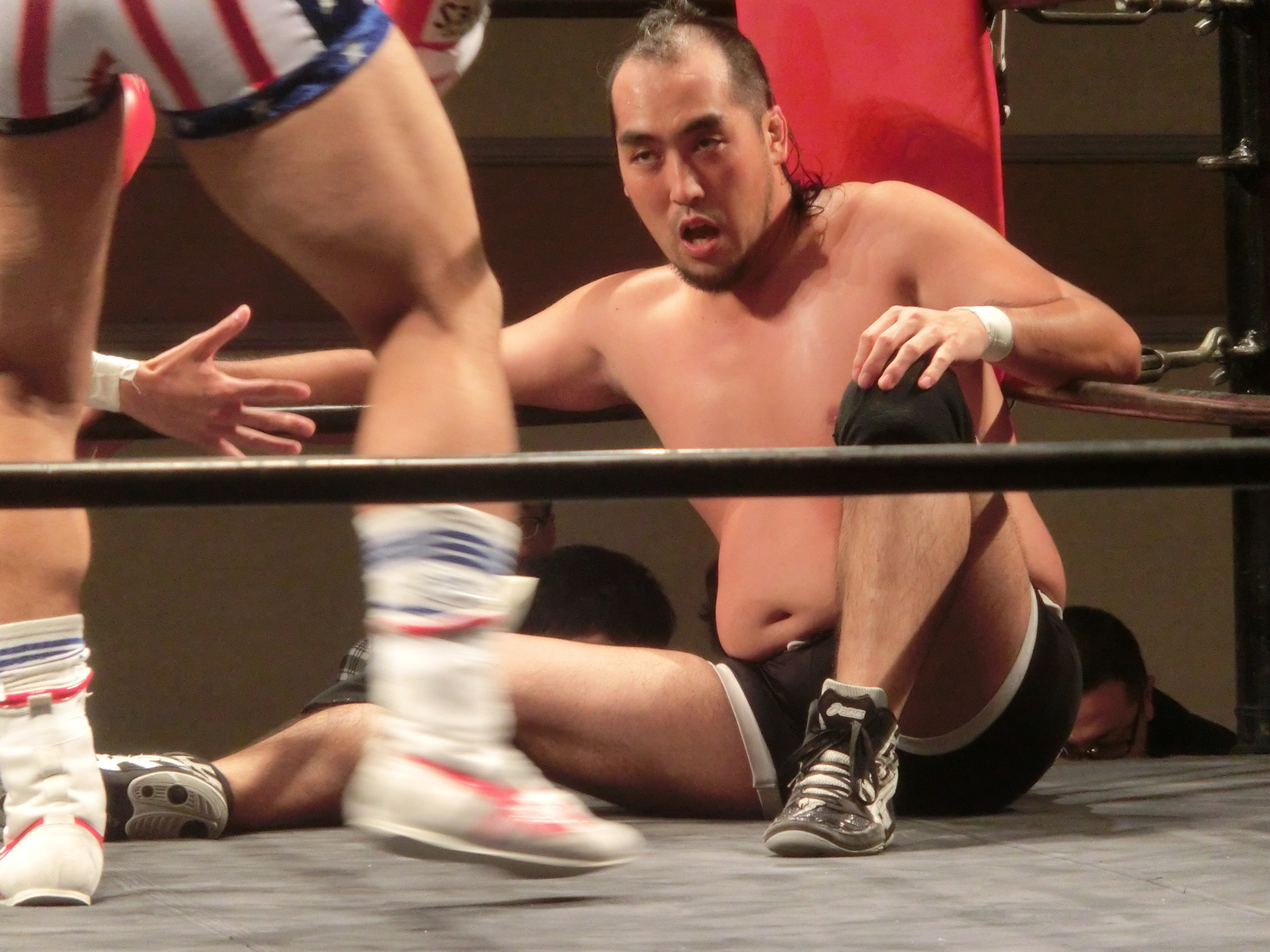 TOSHIYA KAWARAI